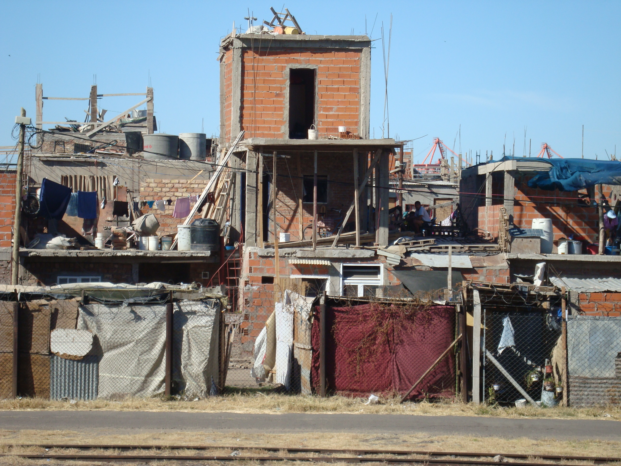 Vista de la Villa 31, cerca de la estación de Retiro.